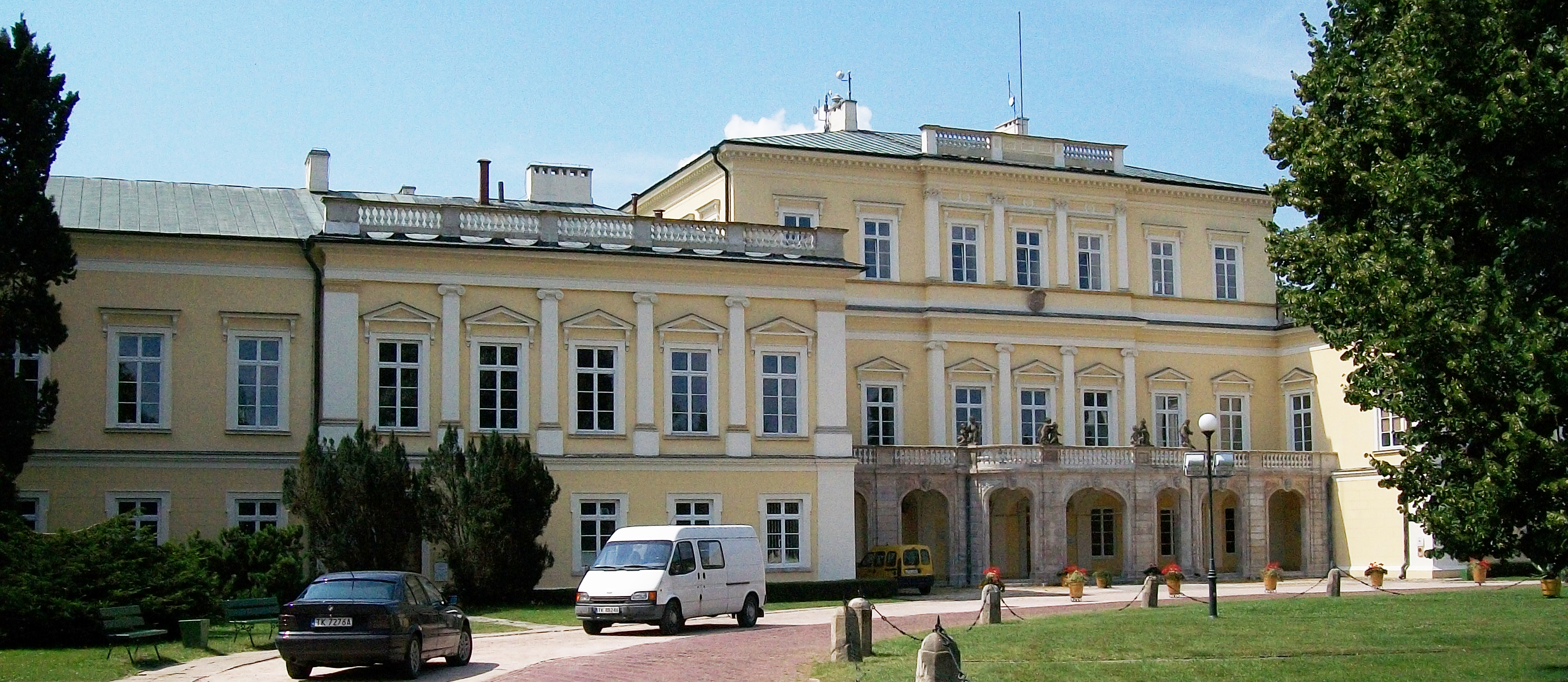 Puławy Pałac Czartoryskich latem 2012 r.